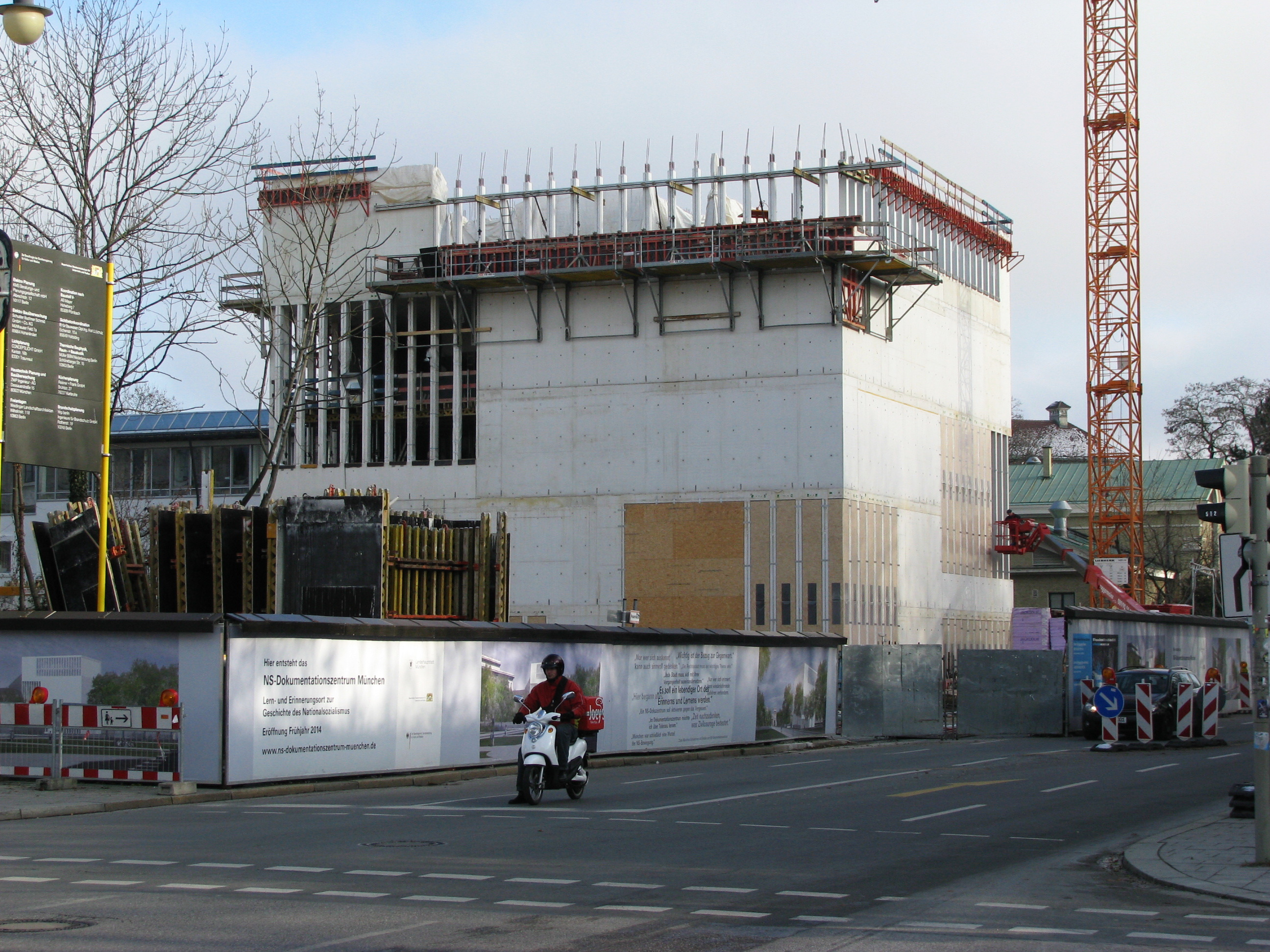 NS-Dokumentationszentrum in München an der Brienner Straße; Baustelle im Dezember 2012.